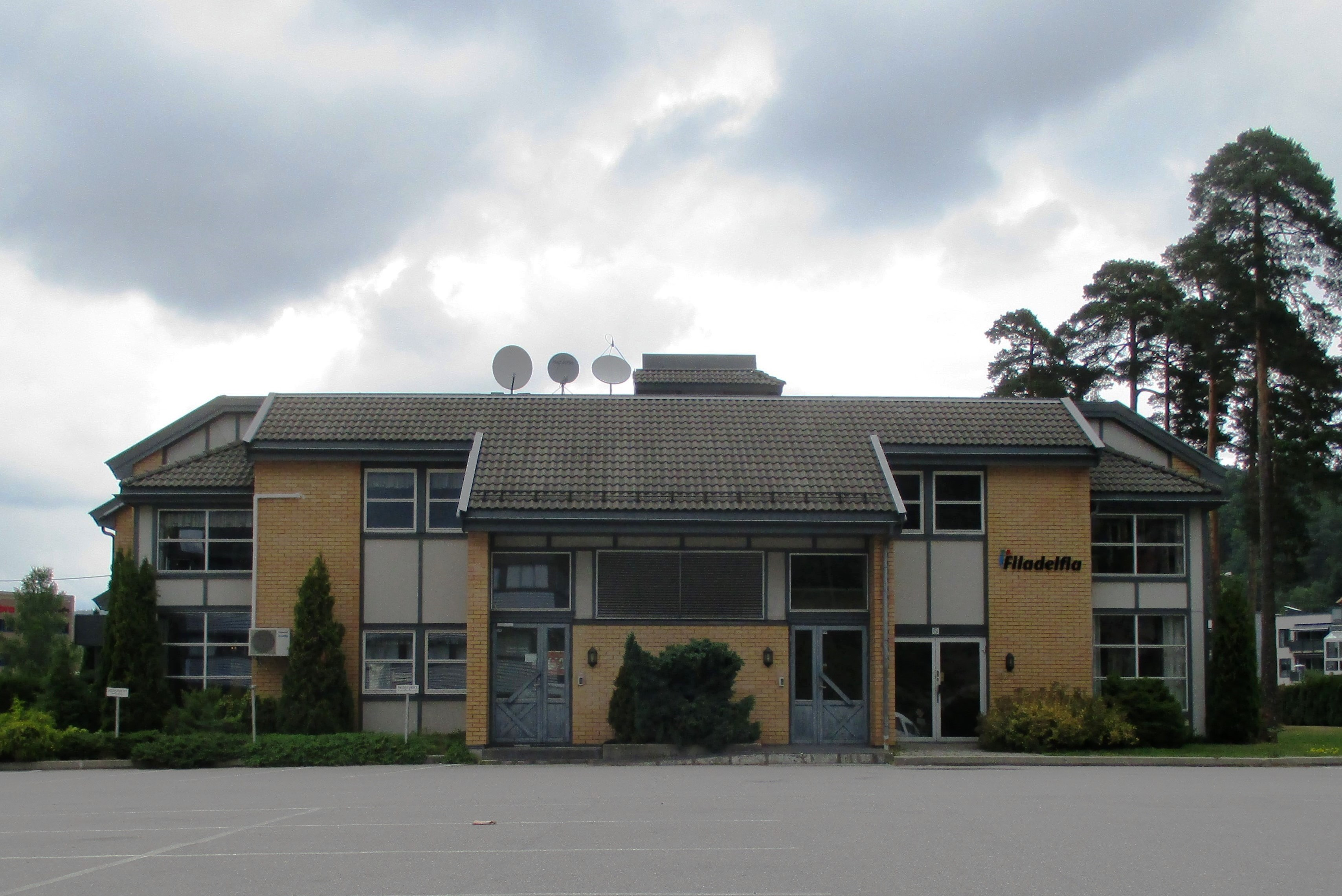 Filadelfia Vennesla